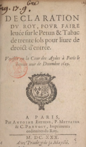 Première taxe sur le tabac, louis XIII, 31 décembre 1629.